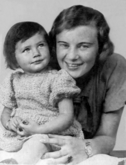 کودکی ثریا اسفندیاری بختیاری